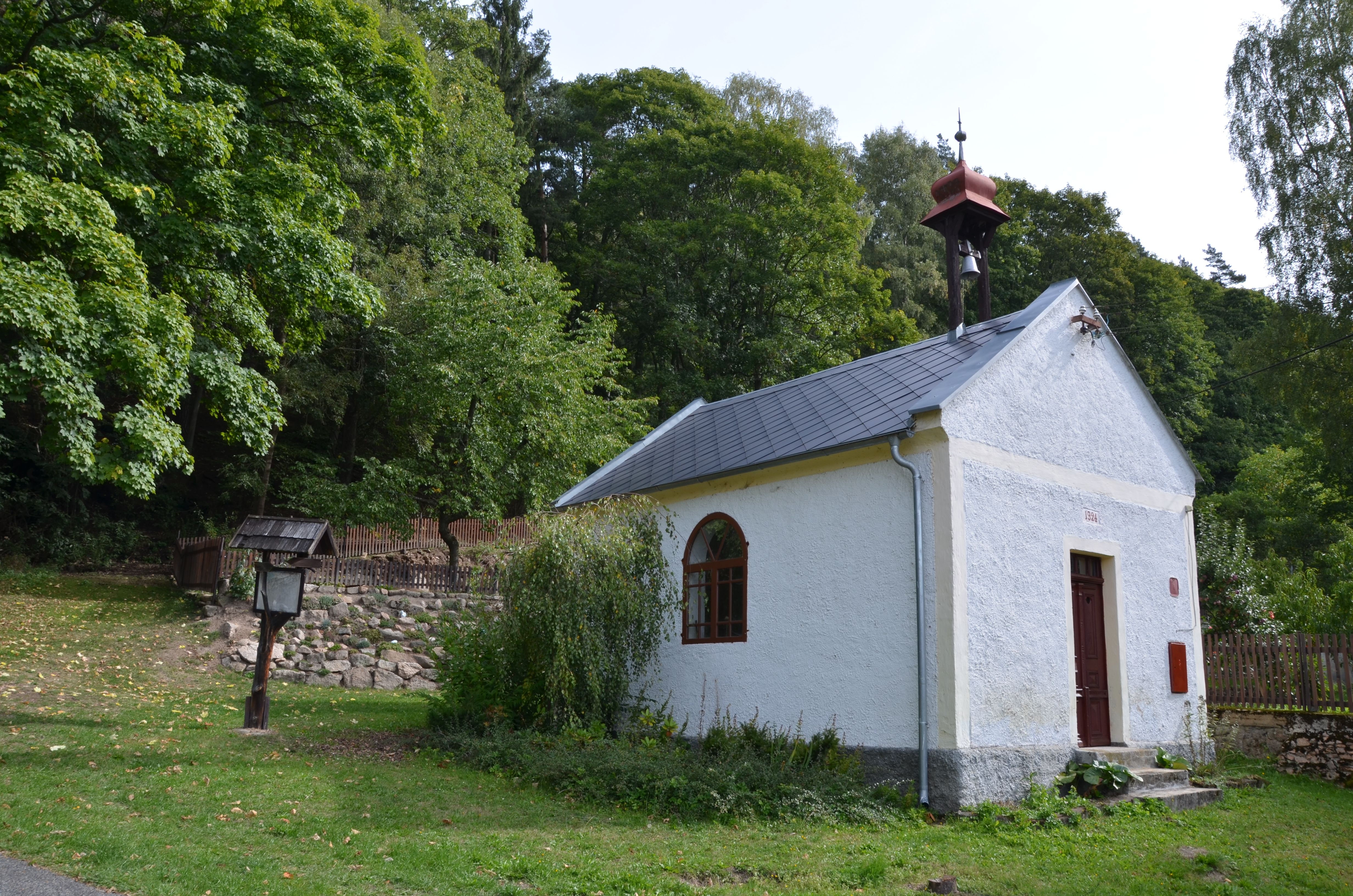 Podlesí - Kaple Sv. Josefa